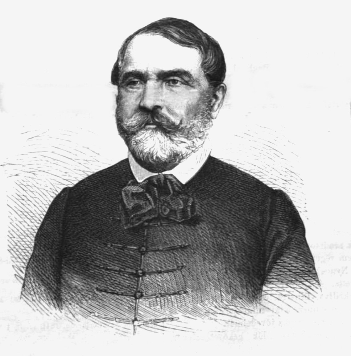 Gáspár András (1804–1884) honvéd vezérőrnagy. Rusz Károly metszete. (Vasárnapi Ujság, 1868. május 3.)